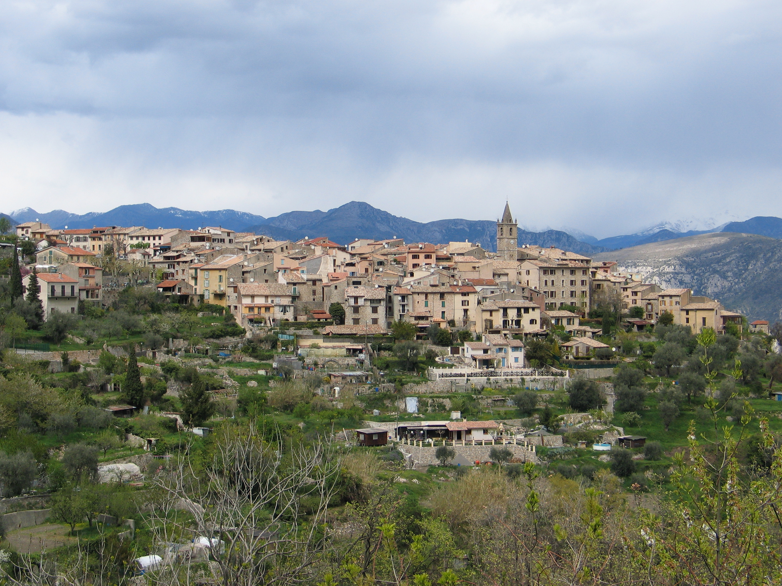 Le Broc, Alpes-Maritimes, France